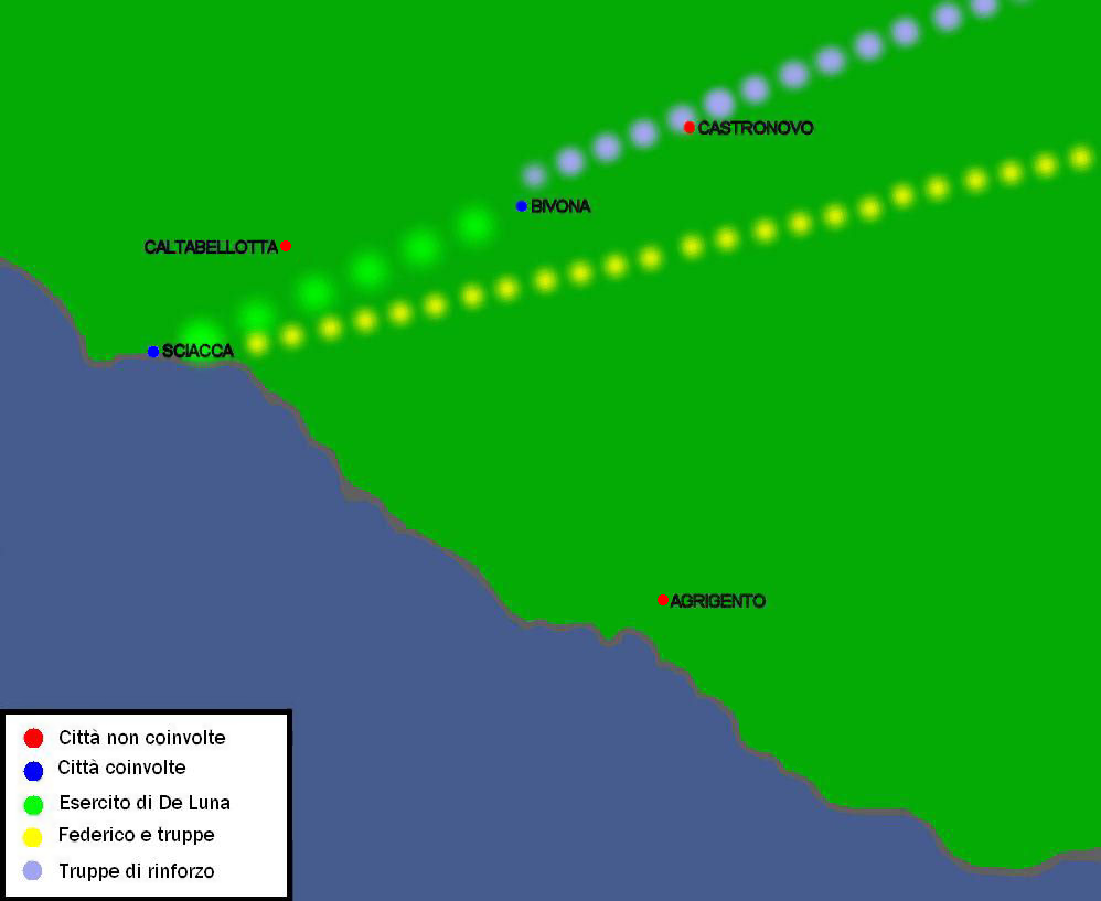 Modifica di File:Luogo secondo caso di sciacca.png